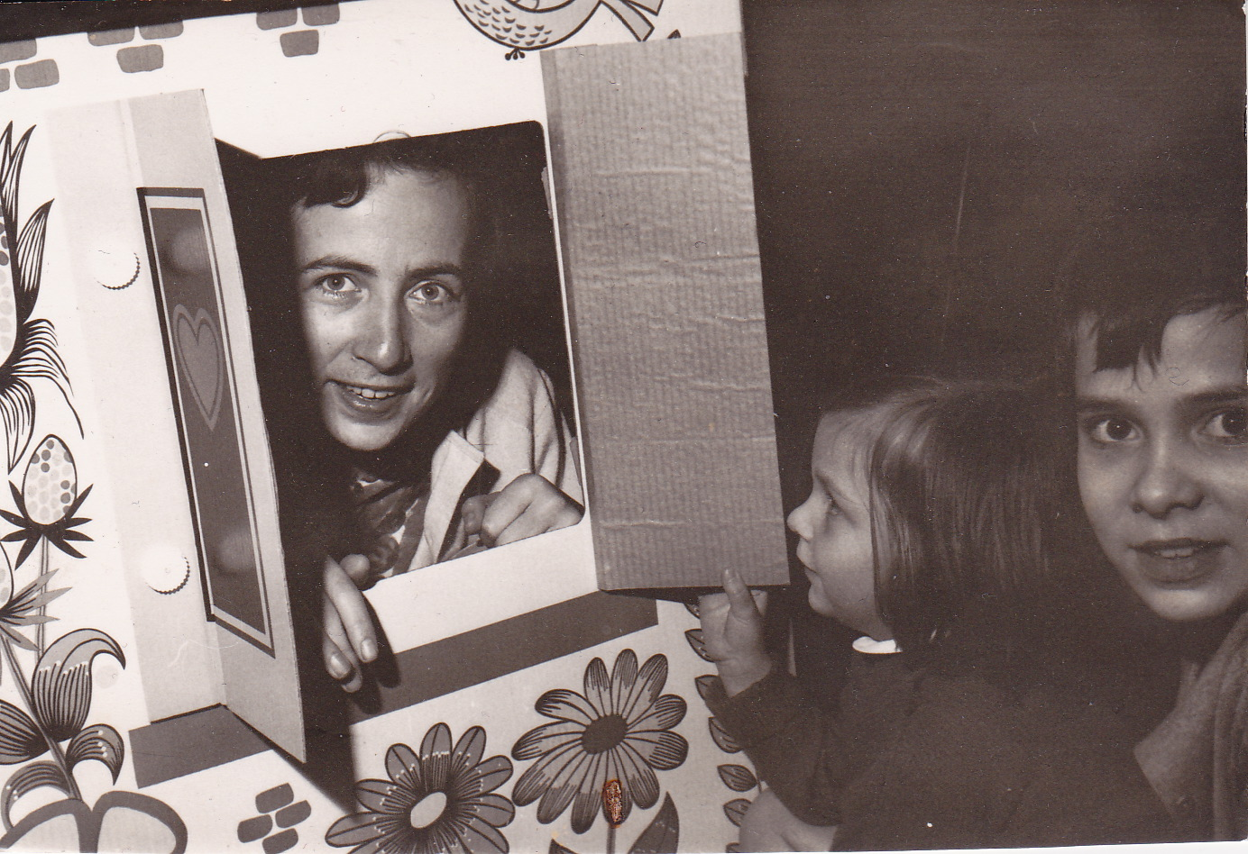 Genevieve Patte dans un atélier avec des enfants